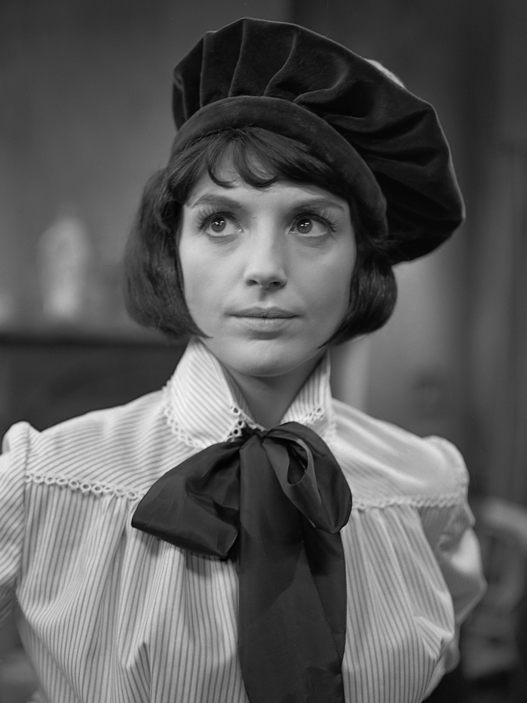 Vara-televisie, TV spel "De schaduw van een revolverman". In een van de hoofdrollen Kitty Courbois 13 februari 1964